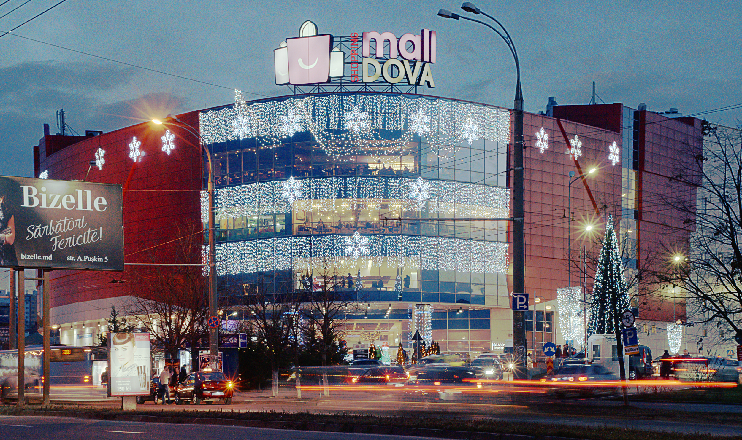 Mall Dova, shopping center in Chisinau, Moldova. (Chișinău)